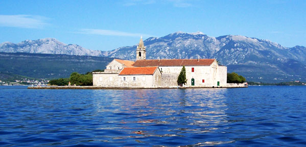 Оток - Госпа од Милости, Никострат Саронски